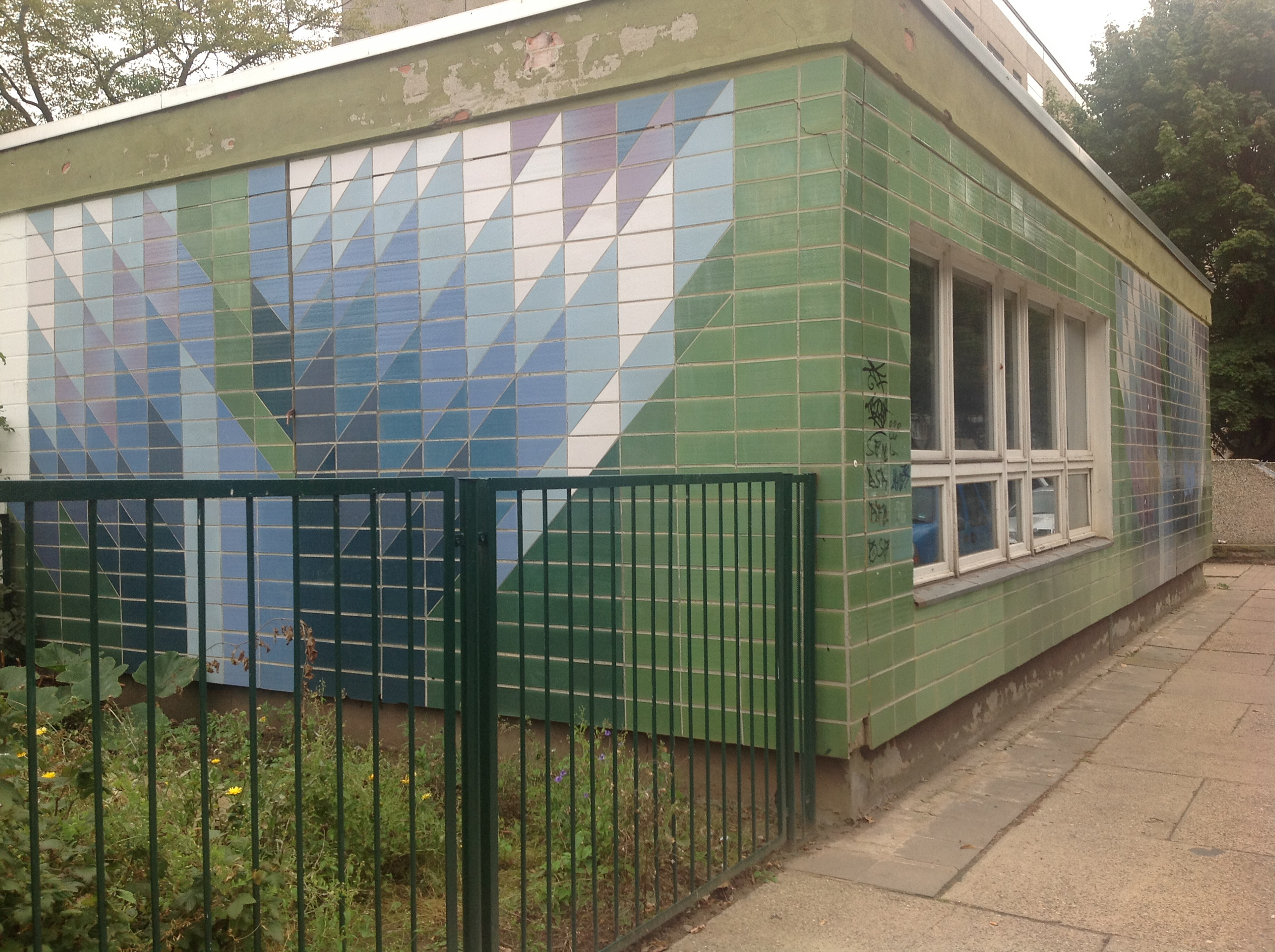 Bruno Groth hat für den Stadtteil Neu Olvenstedt diesen Nachbarschaftstreff mit glasierten Keramikfliesen künstlerisch gestaltet.